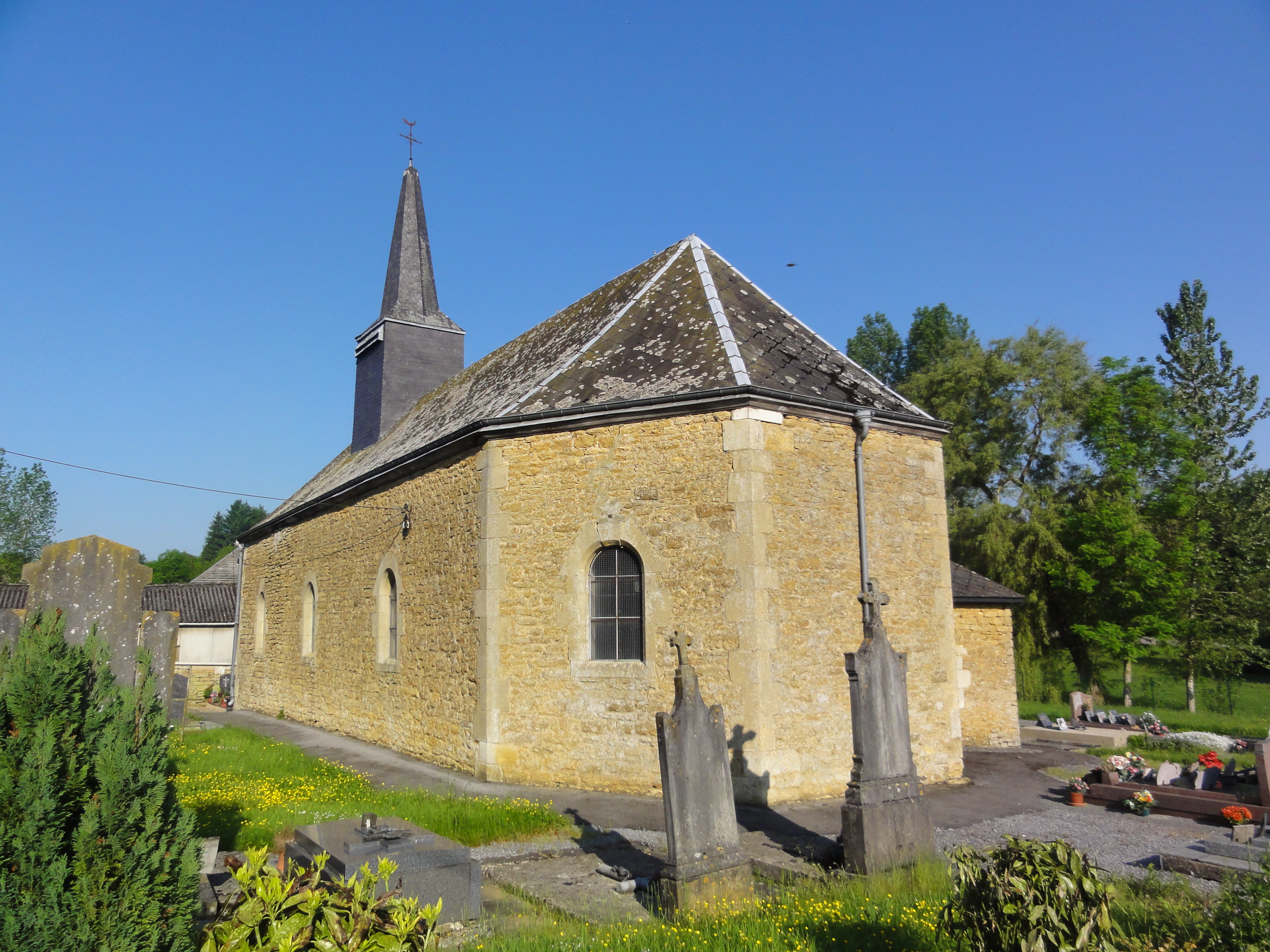 Girondelle (Ardennes) Église